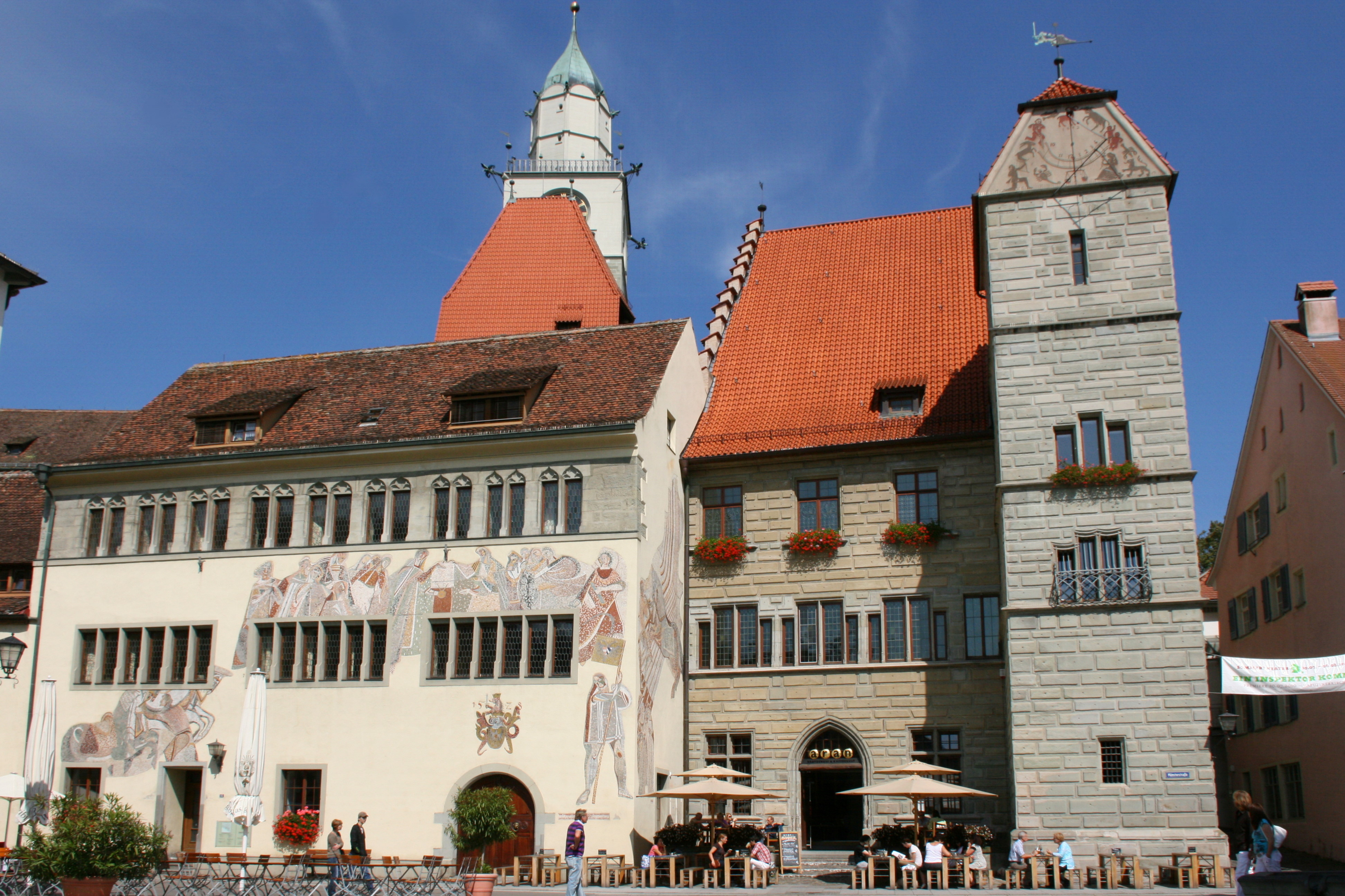 Pfennigtum am Rathaus, Ecke Münsterstraße / Pfennigturmgasse in Überlingen